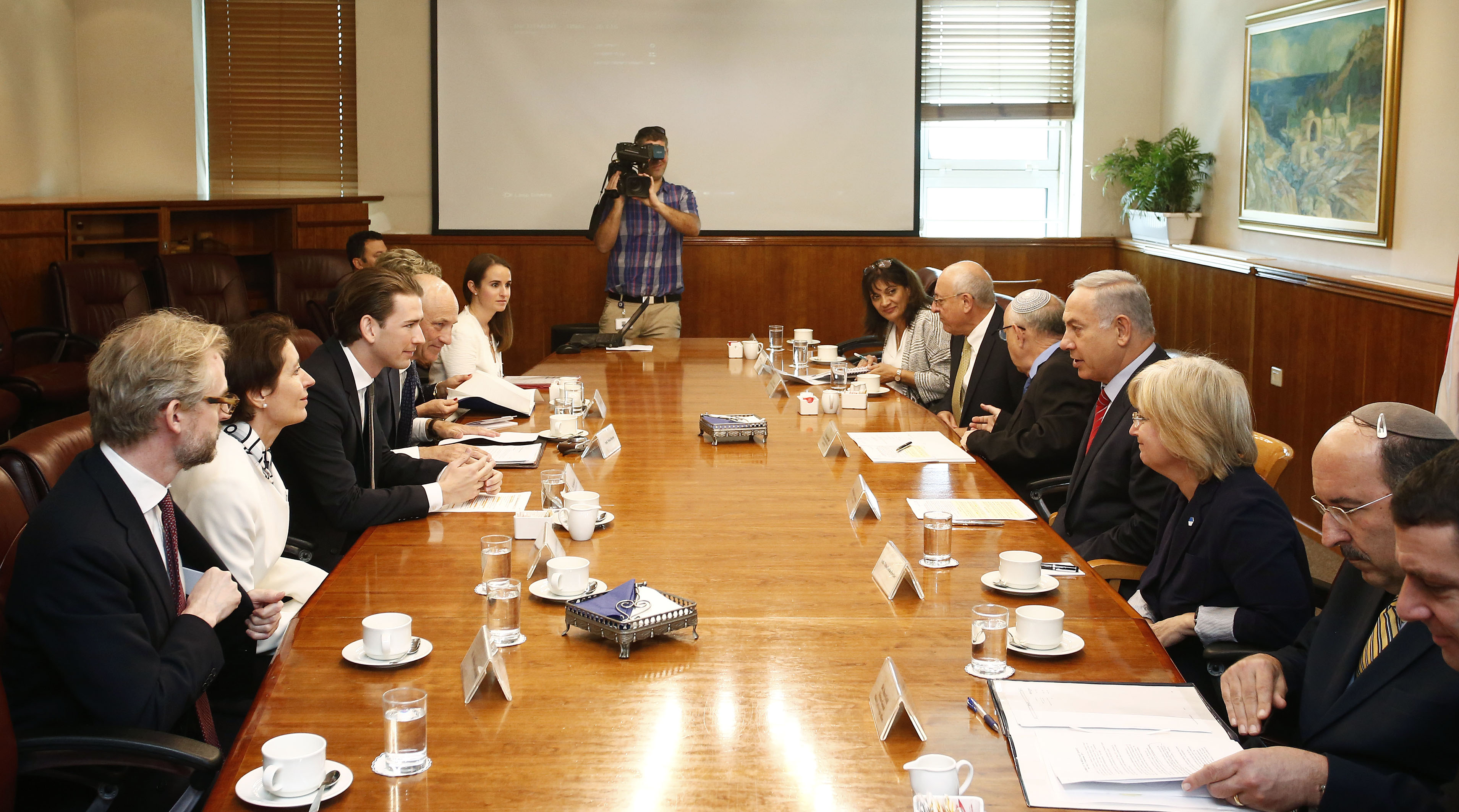 Arbeitsbesuch Israel. Bundesminister Sebastian Kurz trifft Premierminister Benjamin Netanjahu. Jerusalem. 16.05.2015, Foto: Dragan Tatic Sebastian Kurz visit to Israel, May 2016